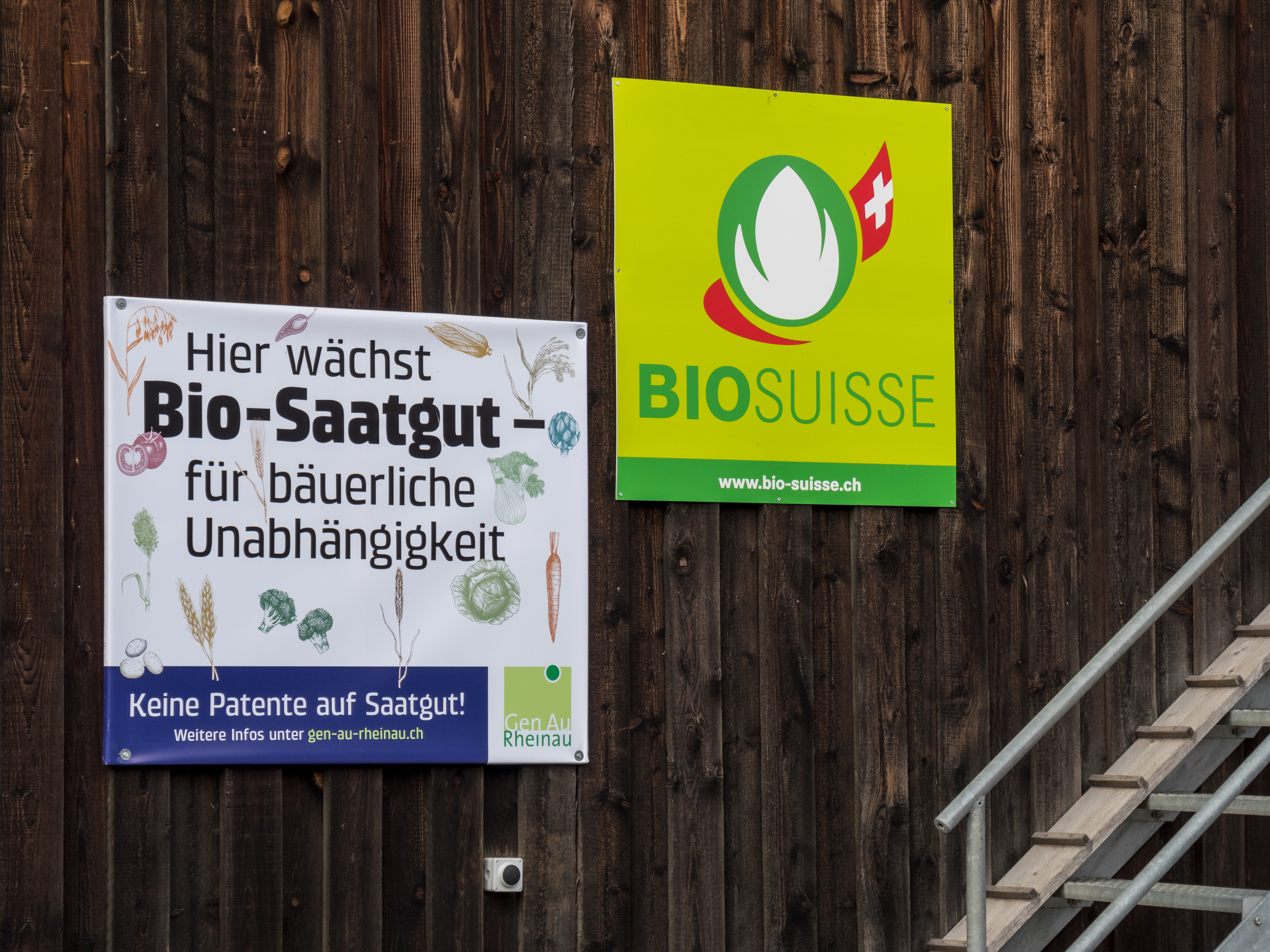 "Keine Patente auf Saatgut". Bio-BauernProtest in der Schweiz gegen die Patentierung von Saatgut.